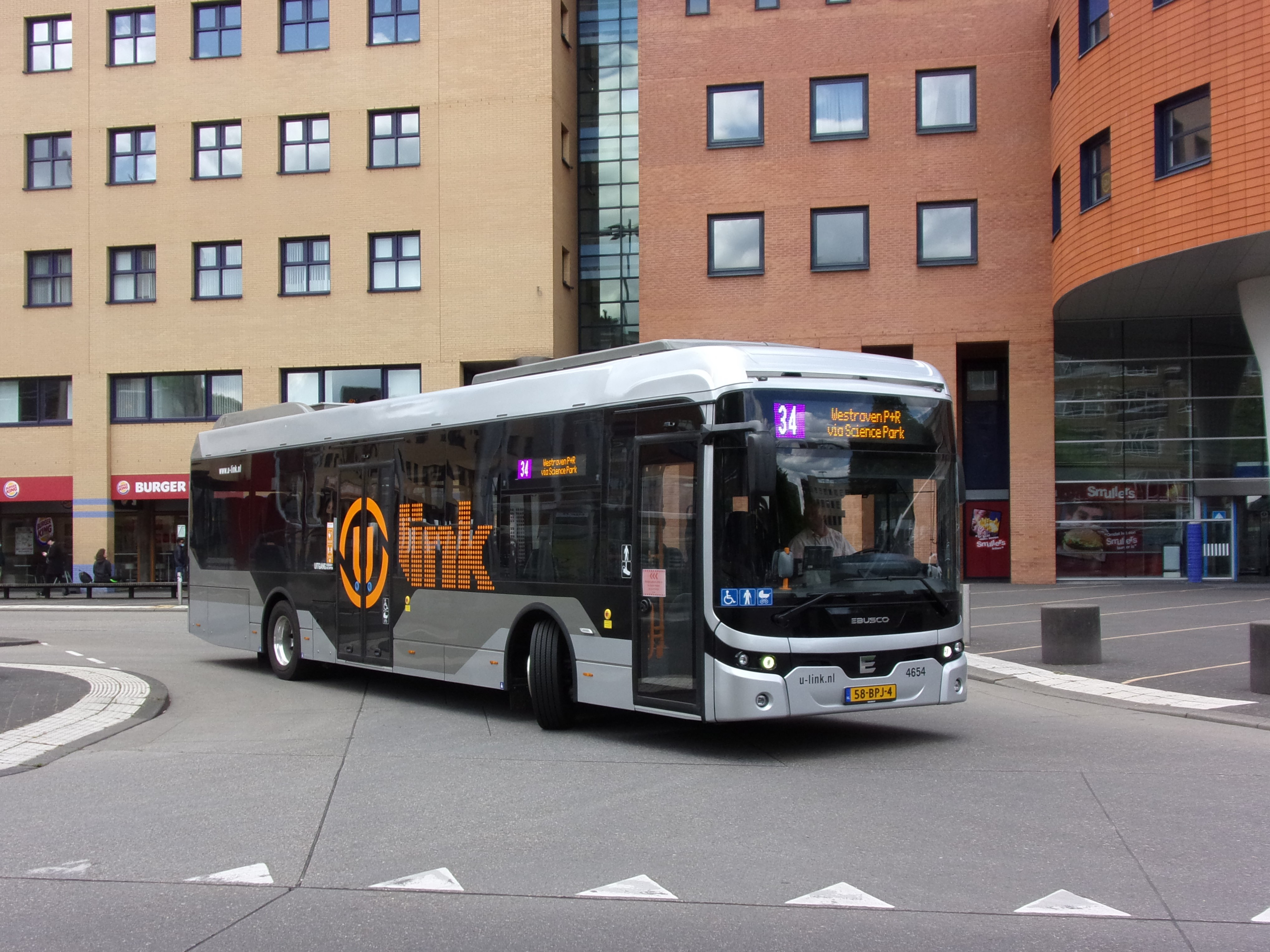 4654 is een Ebusco 2,2 van Qbuzz U-OV in de kleuren van U-link.